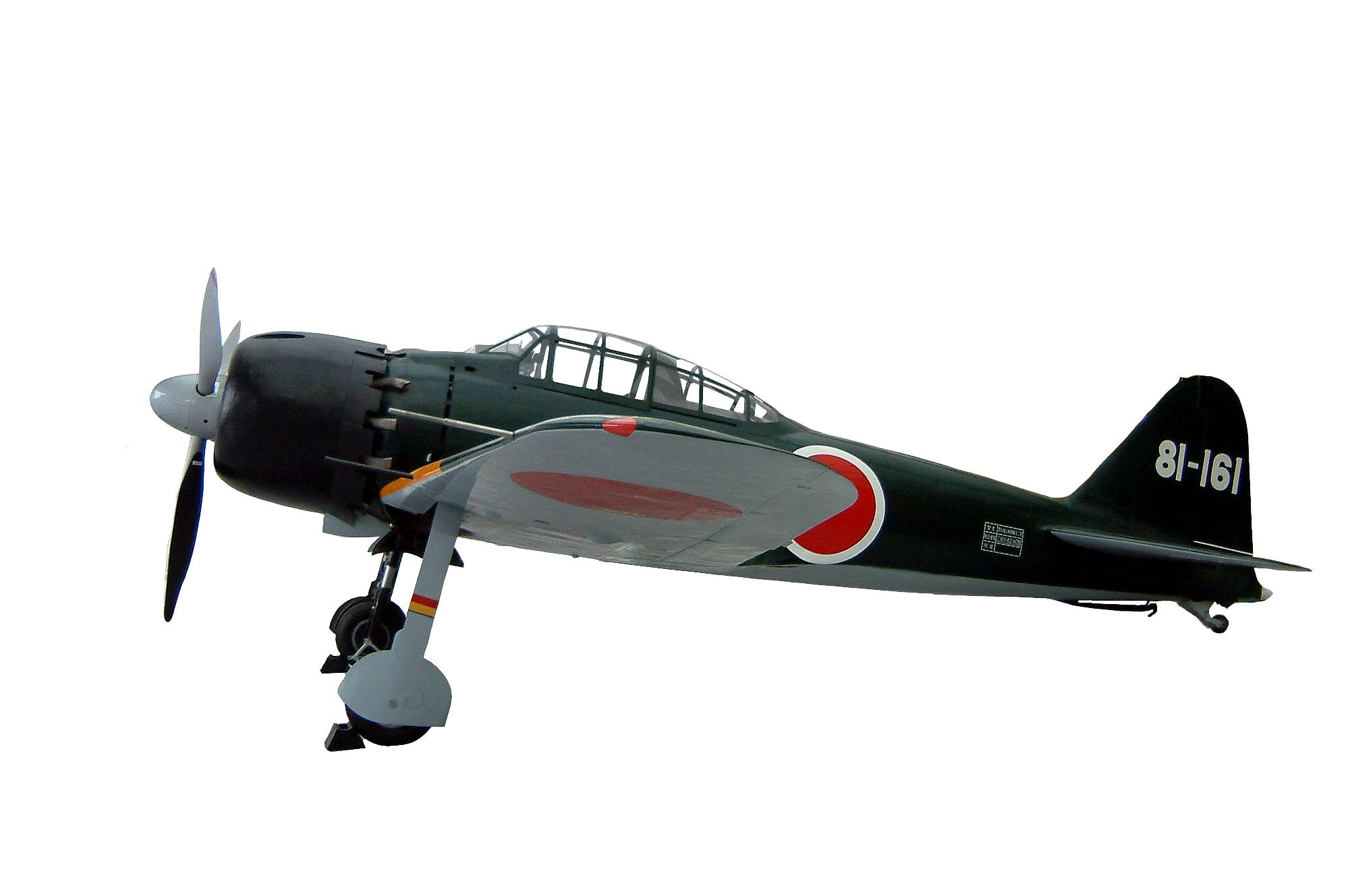 Mitsubishi Zero Model 52 (A6M5) at Yasukuni Shrine Yushukan, Tokyo